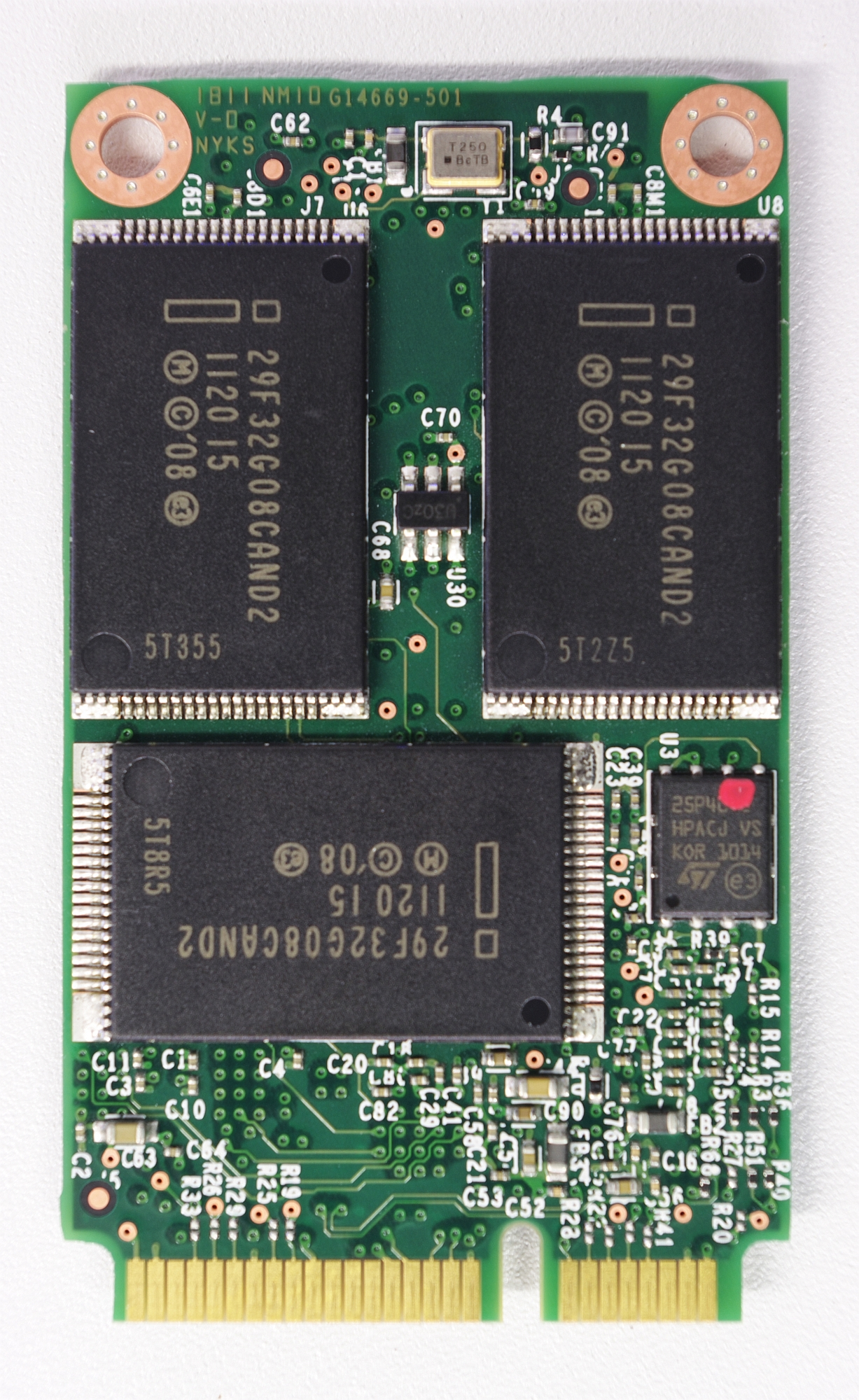 Intel SSD Mini-PCIe